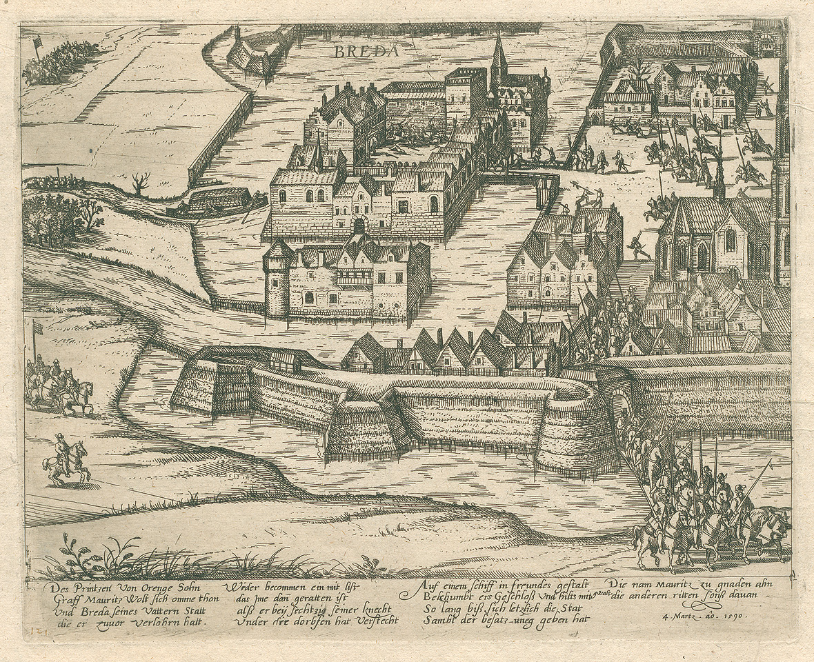 Inname van Breda in 1590 met een turfschip